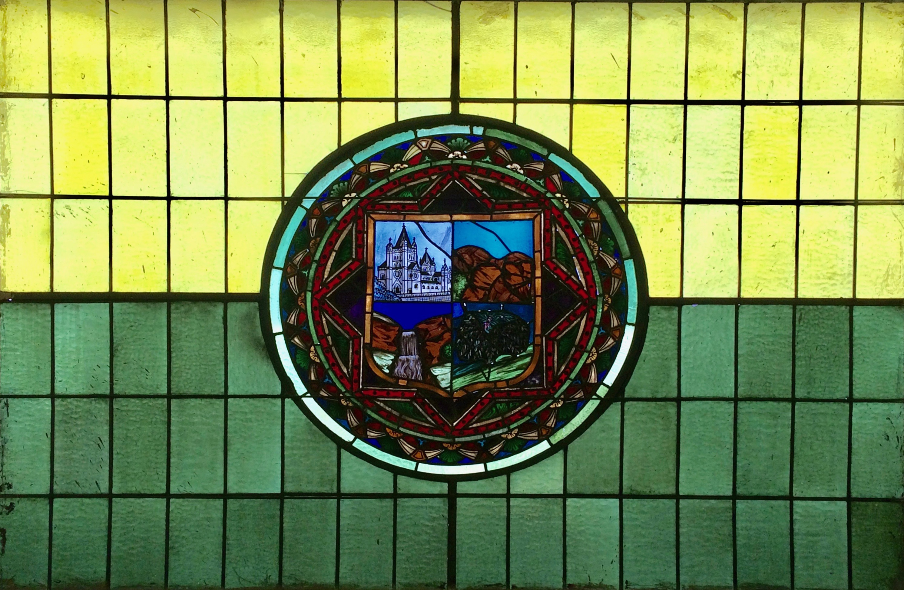 Vitral alusivo a la Ciudad en la Casa Consistorial de Sonsón